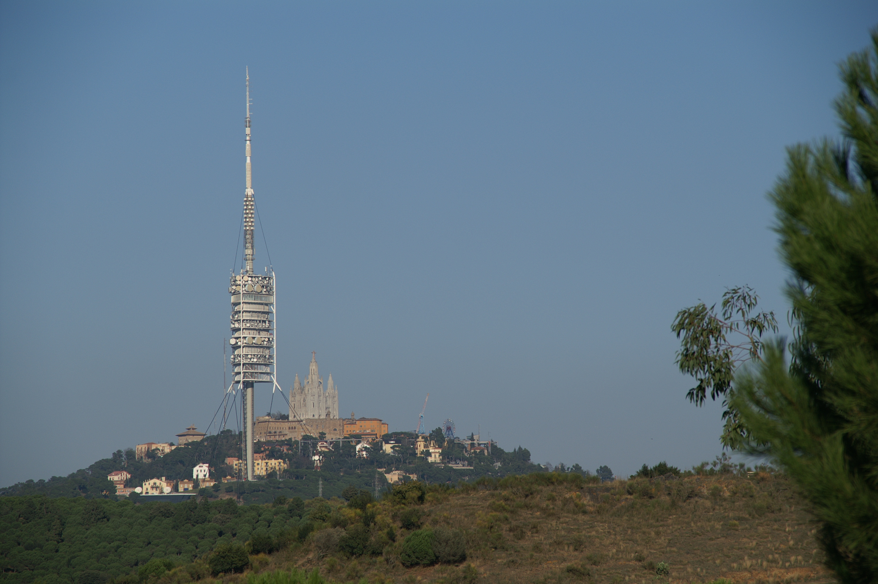 Fernsehturm von Barceloa auf dem Tibidabo